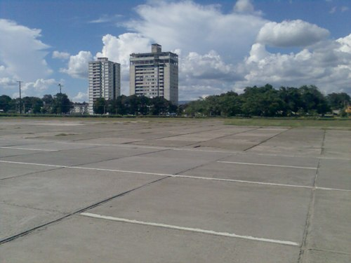 Panorama de la ciudad de Guantánamo